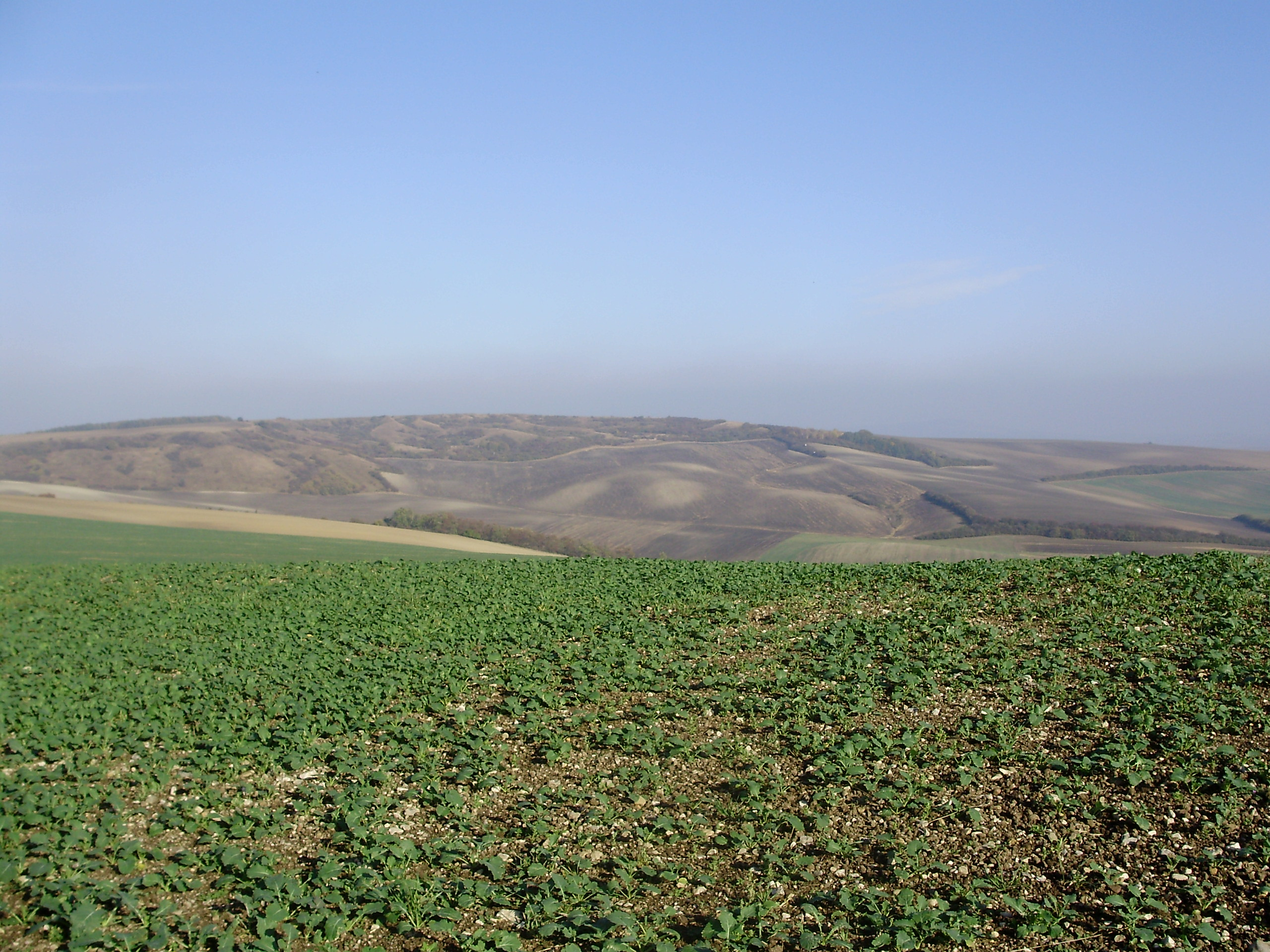 Větrník (Vyškov- Czech republic)